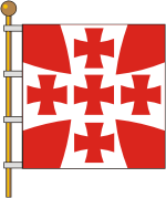 Прапор с. Крупське (Кіровоградський район)